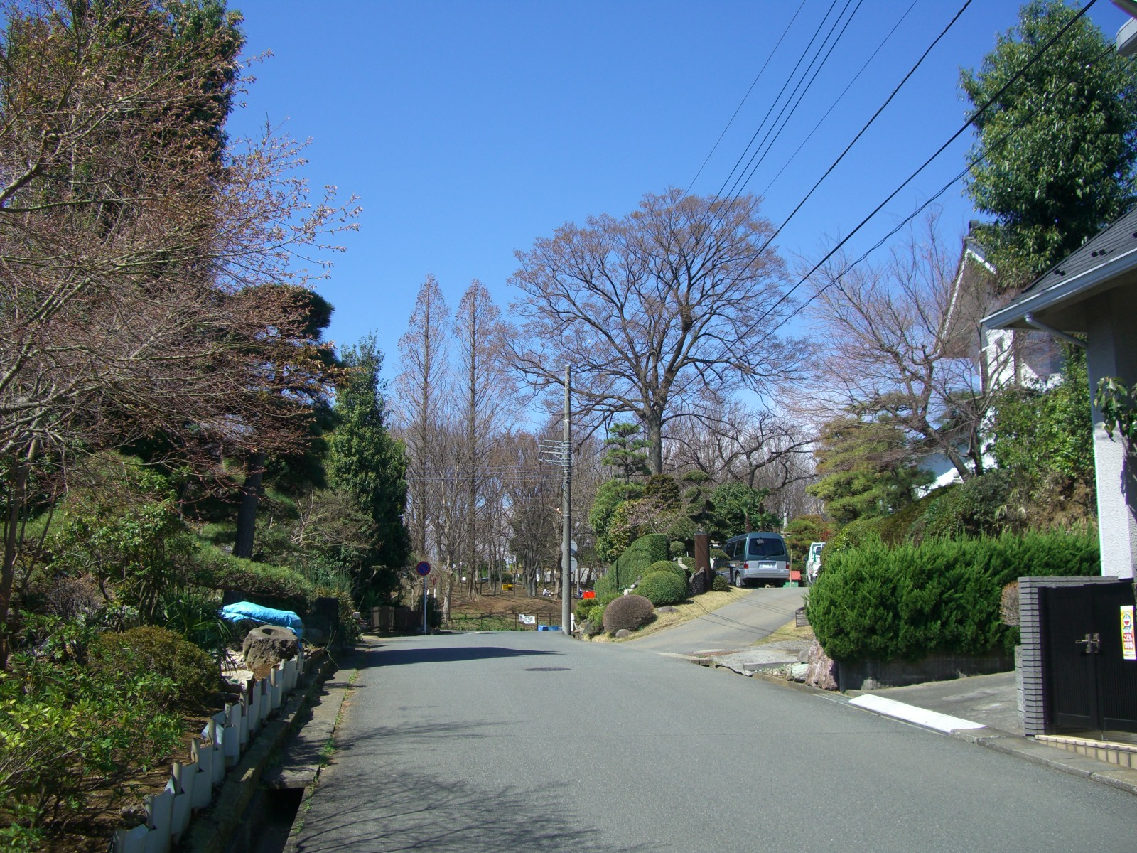 有馬中央公園付近